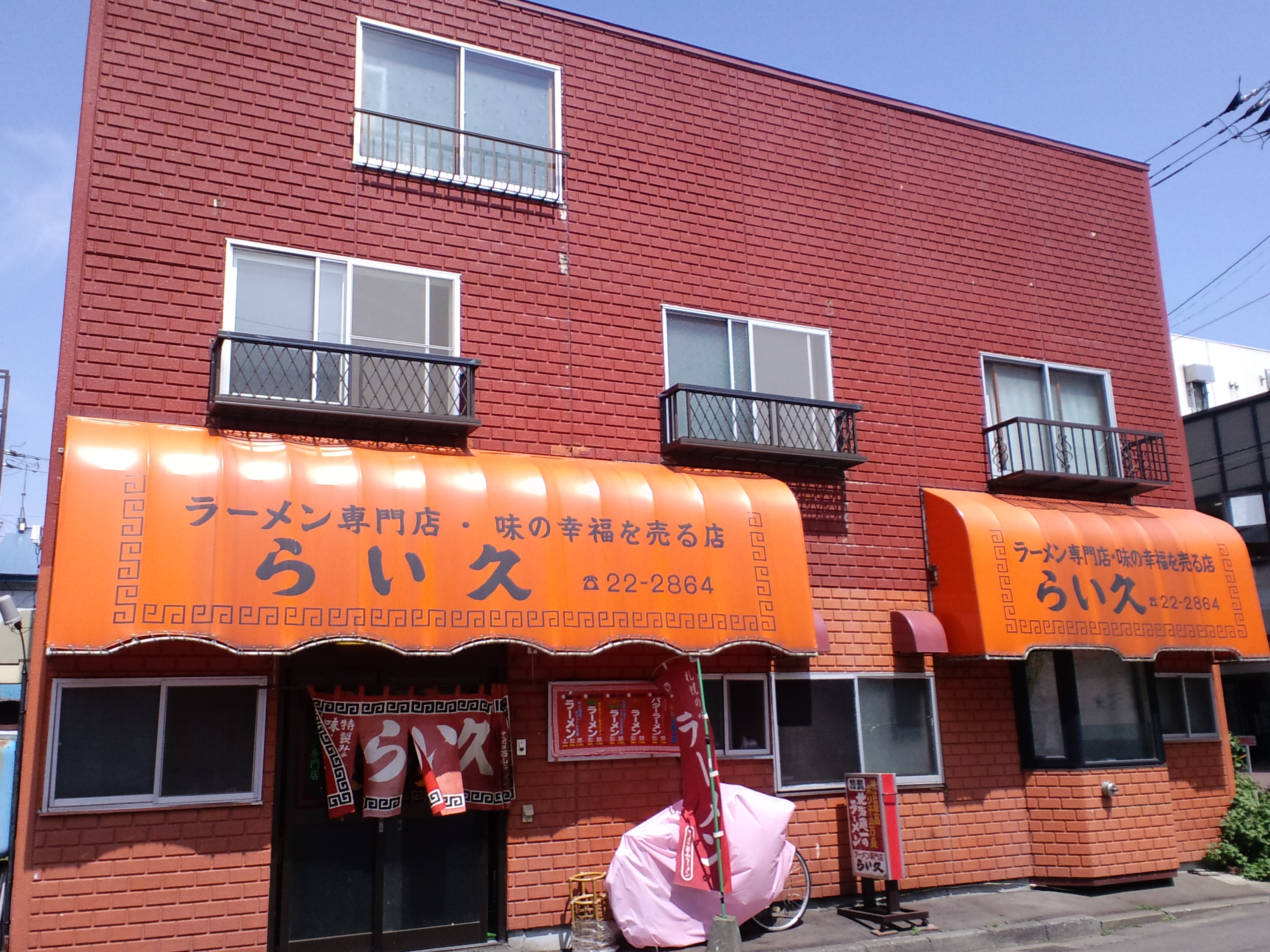 らい久ラーメン店（北海道岩見沢市）